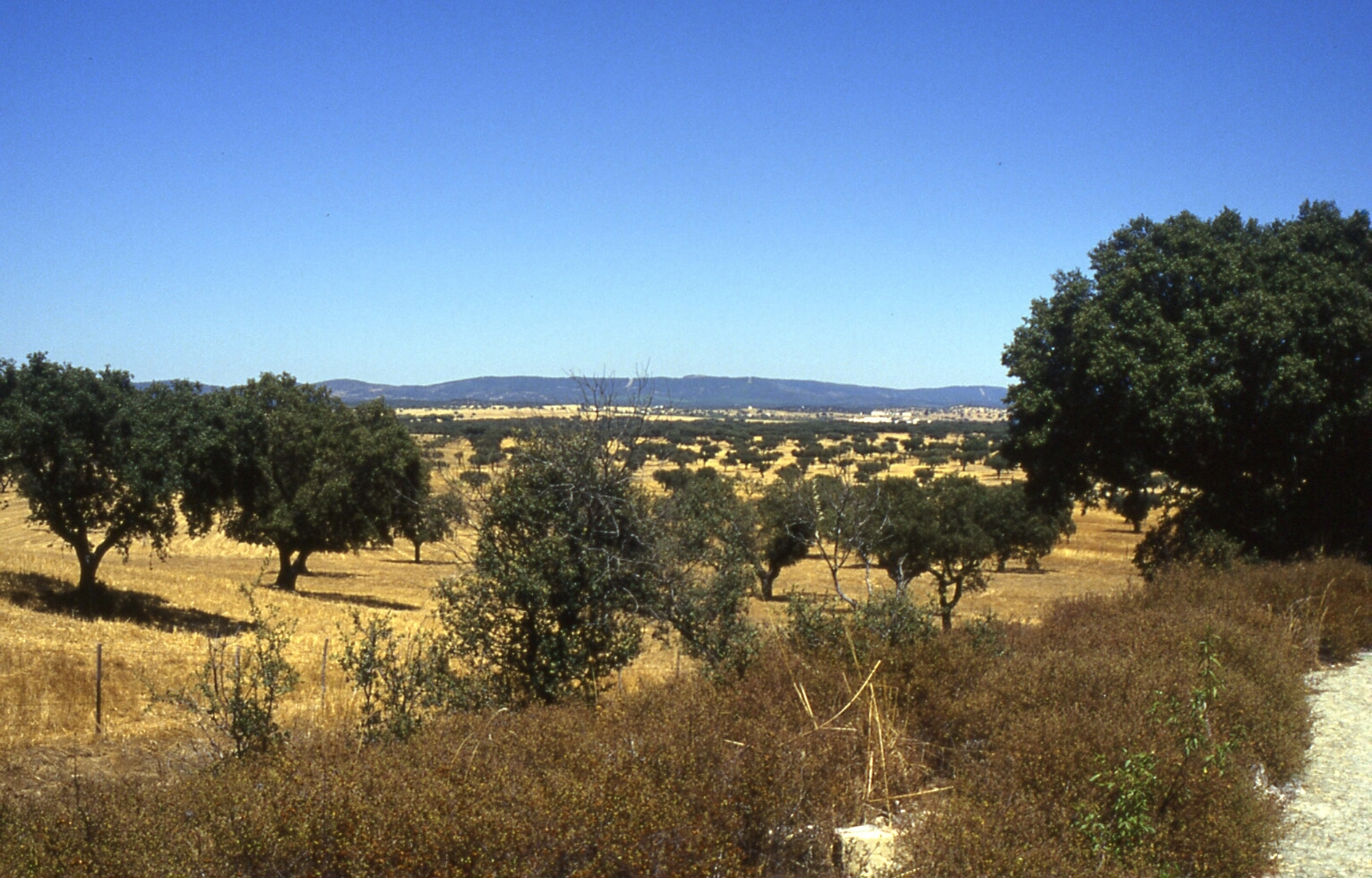 AlentejoPortugal1994